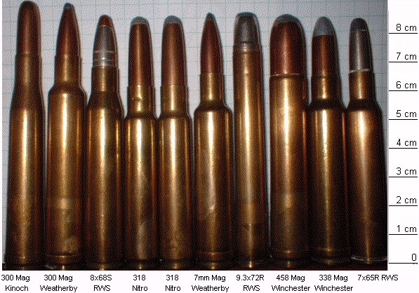 My picture ( Lax) 300 Mag 8x68 318 Nitro 7mm Mag 9,3x72R 458 Mag 338 Mag 7x65R